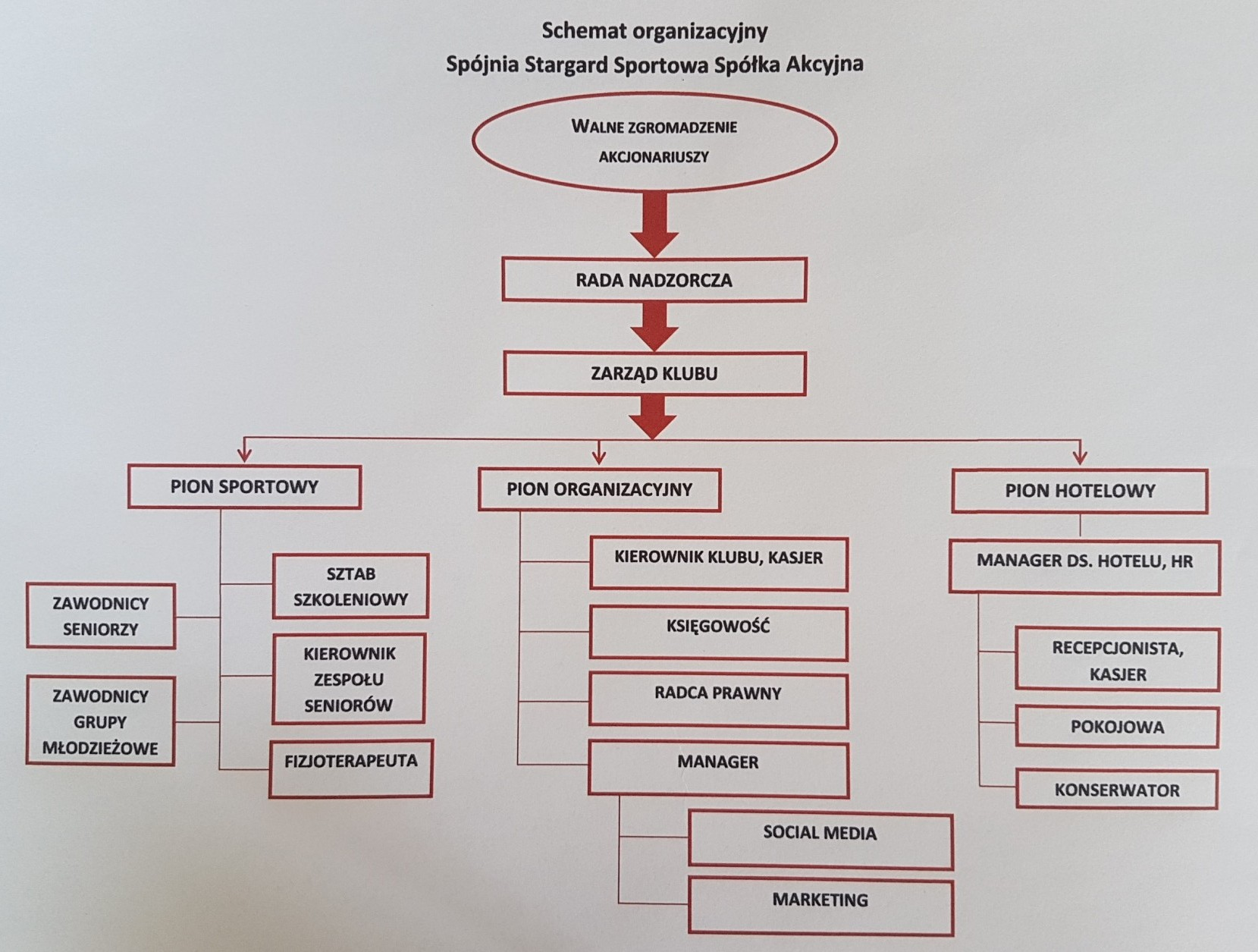 Schemat organizacyjny Spójni Stargard SSA